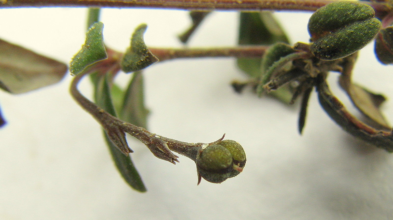 Fruit.